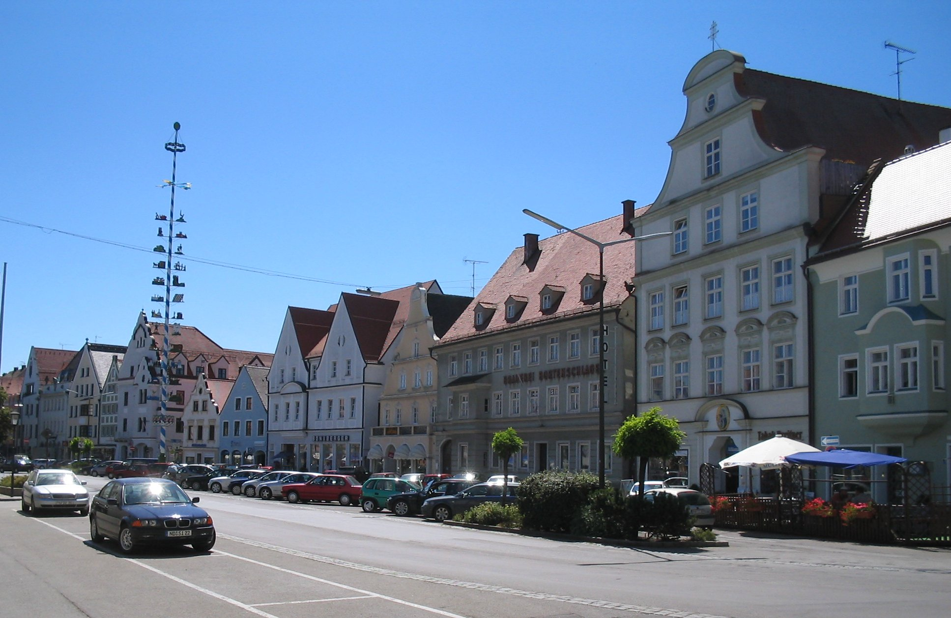 Hauptplatz in Pfaffenhofen